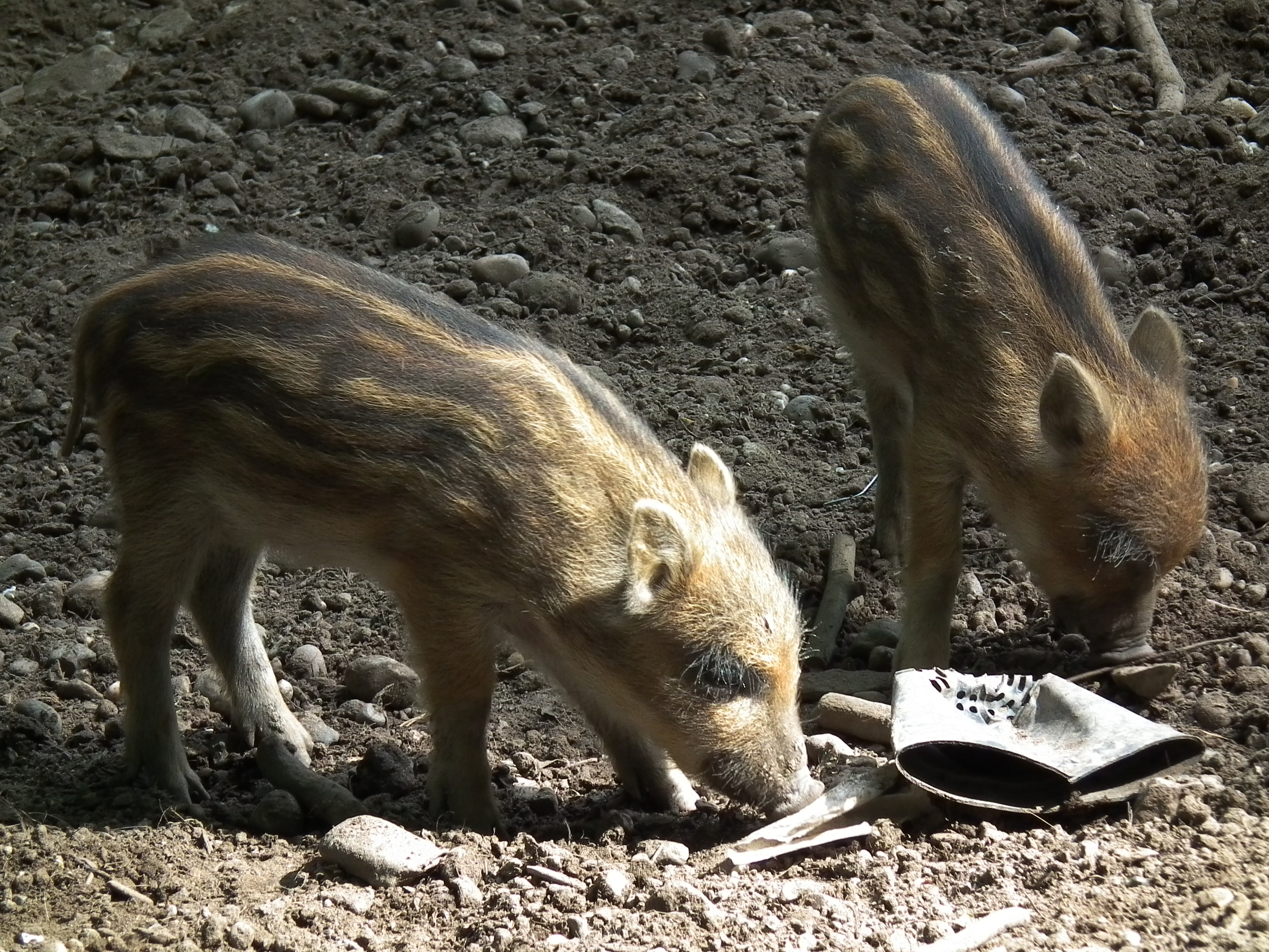 Wildschweinfrischlinge (Sus scrofa) im Wildpark Rheingönheim (Rheinland-Pfalz, Deutschland)